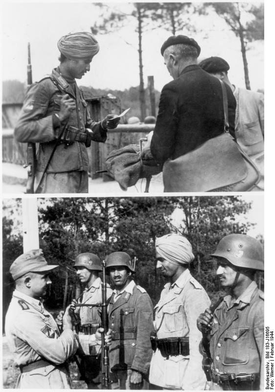 Soldaten der Legion "Freies Indien" Aus den in Europa lebenden Indern aller Stämme und Religionen hat sich eine indische Legion gebildet, die, der deutschen Wehrmacht angegliedert . Unser Bild zeigt oben einen Angehörigen des indischen Volksstammes der Sikhs, der als Brückenwache eingesetzt ist. Er kontrolliert jeden, der die Brücke passieren will, auf seine Ausweise. - Unten sehen wir die Ausbildung indischer Freiwilliger durch einen deutschen Unteroffizier, der ihnen den Gewehrgriff in seinen einzelnen Phasen demonstriert. PK-Aufnahme Kriegsberichter Werner (Sch) 12.2.44 [Herausgabedatum]